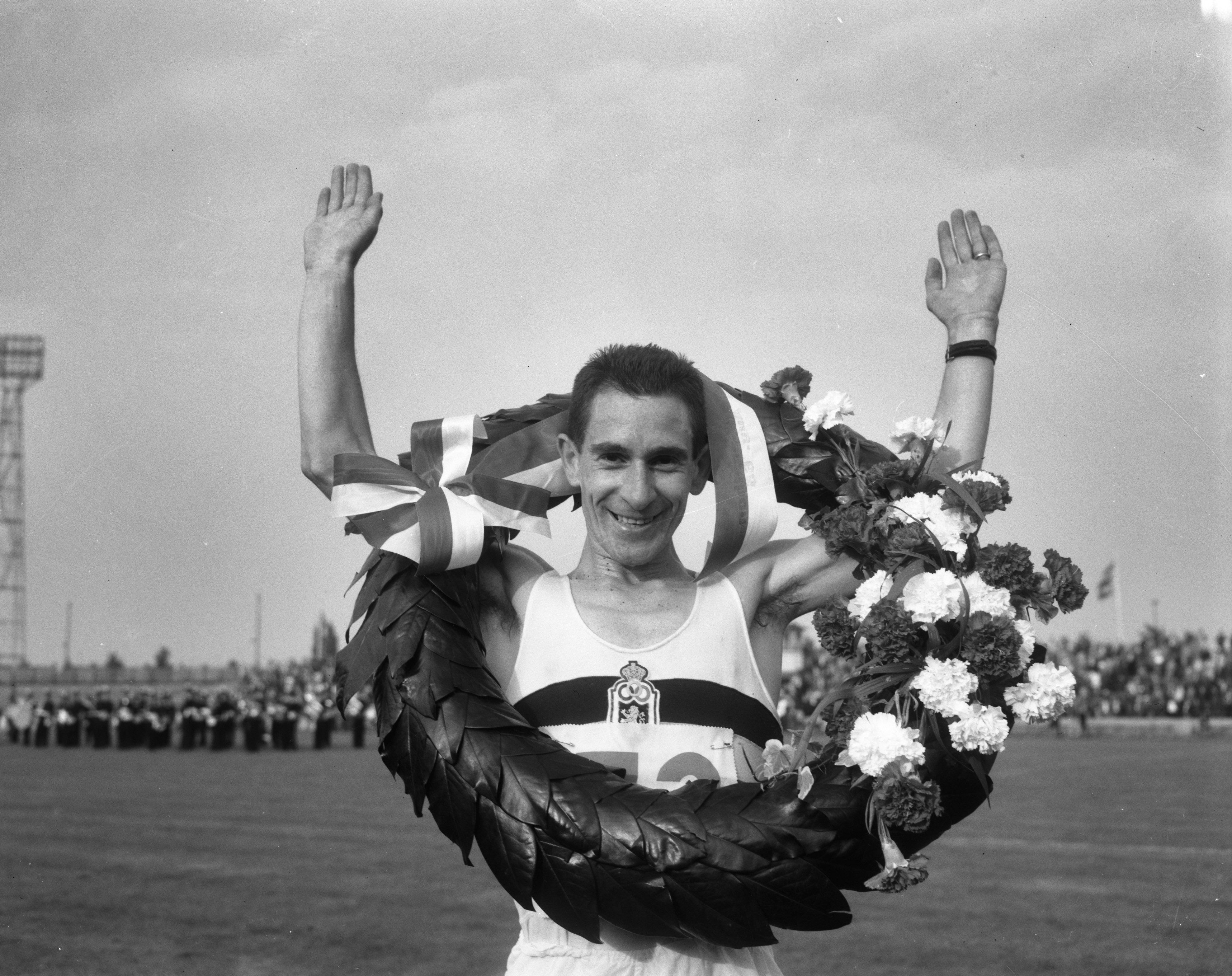 Collectie / Archief : Fotocollectie Anefo Reportage / Serie : [ onbekend ] Beschrijving : Internationale marathonloop te Enschede, Van der Driesse (België) Datum : 28 augustus 1965 Locatie : Enschede Trefwoorden : atletiek, marathon Fotograaf : Bilsen, Joop van / Anefo Auteursrechthebbende : Nationaal Archief Materiaalsoort : Negatief (zwart/wit) Nummer archiefinventaris : bekijk toegang 2.24.01.04 Bestanddeelnummer : 918-1160